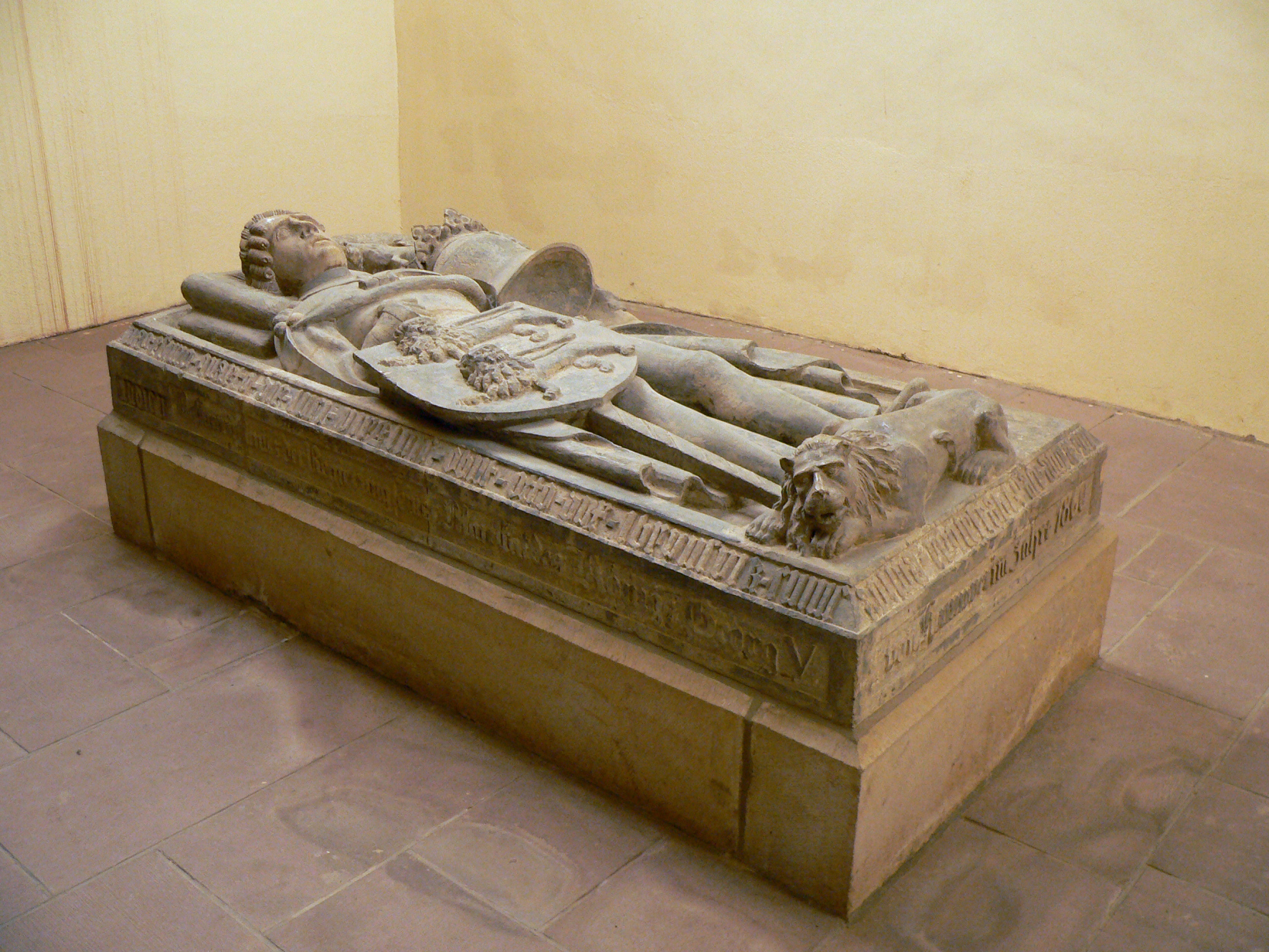 Grab Otto I. (Braunschweig-Göttingen) im Kloster Wiebrechtshausen